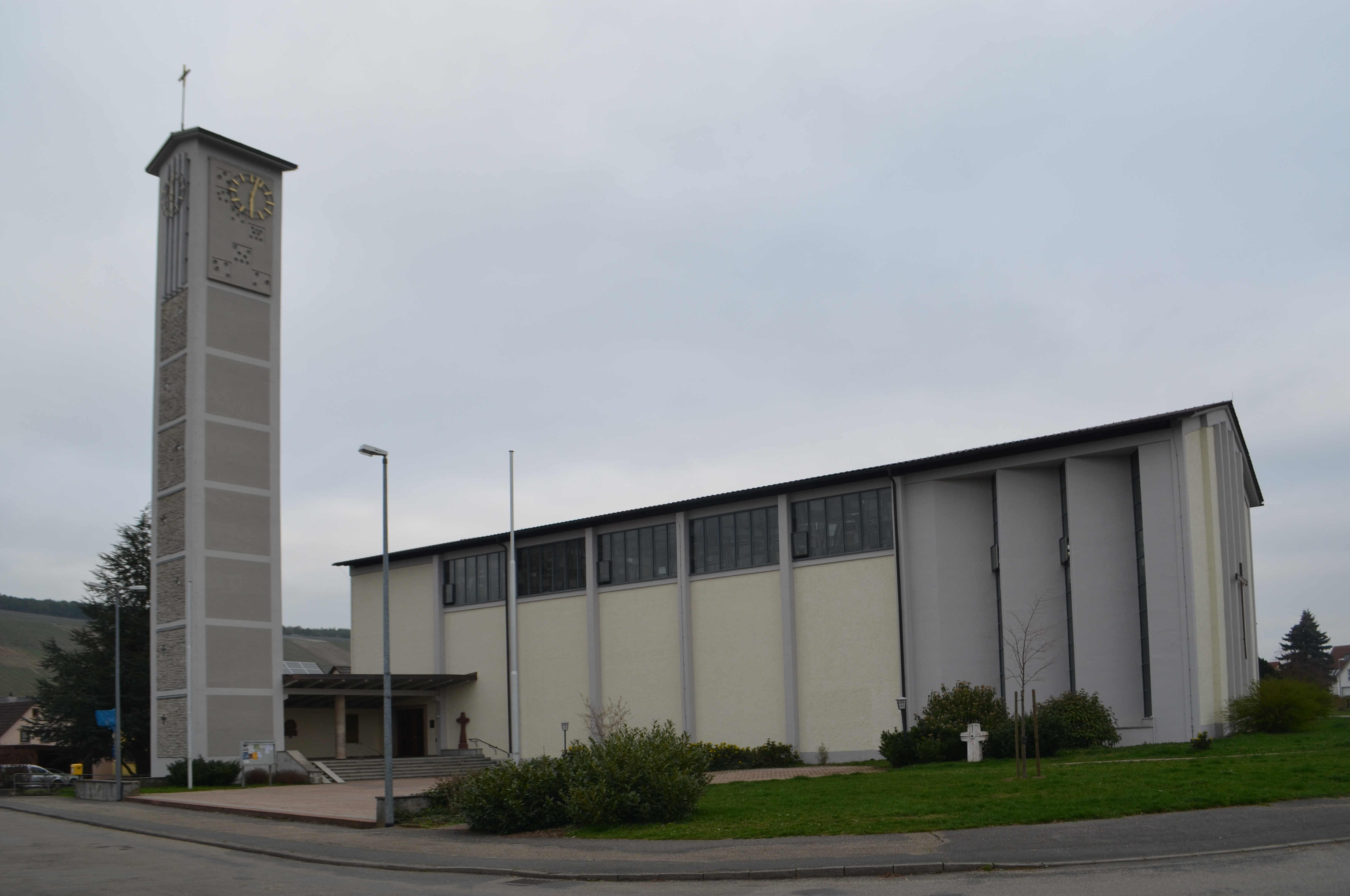 Markelsheim, Engelsbergstraße 11, Katholische Pfarrkirche